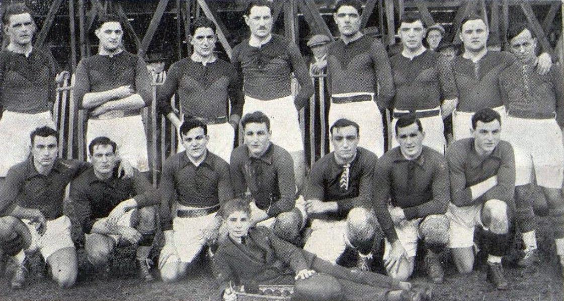 L'AS Bitteroise en 1927.